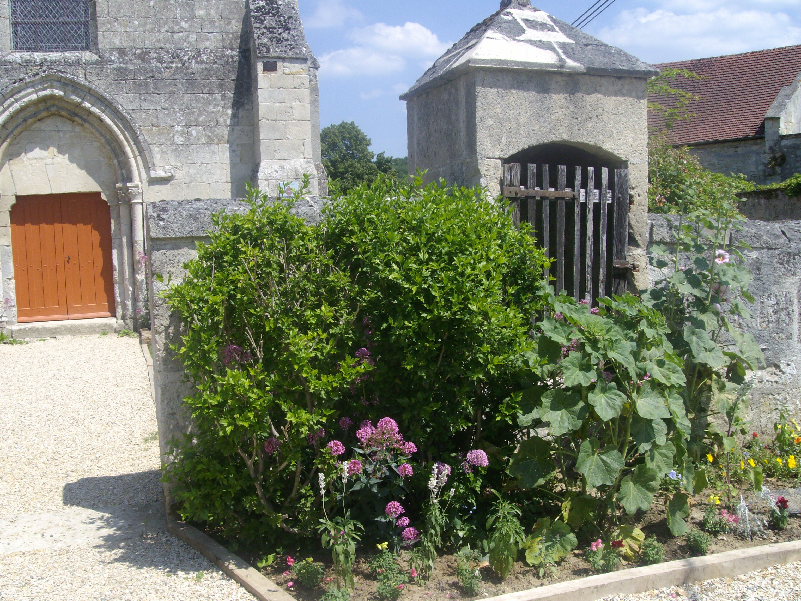 Fleurs devant l'entrée de l'église Notre-Dame de Pondron, Fresnoy-la-Rivière